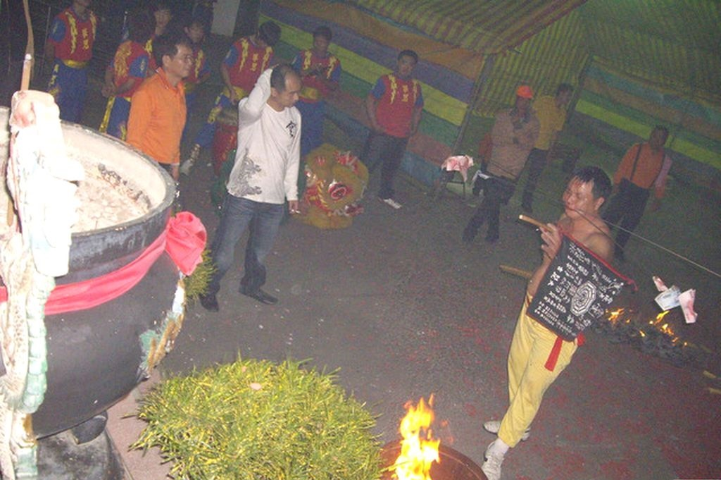 乩童—用長銅針來貫穿臉頰而封口（俗稱灌口針）儀式。